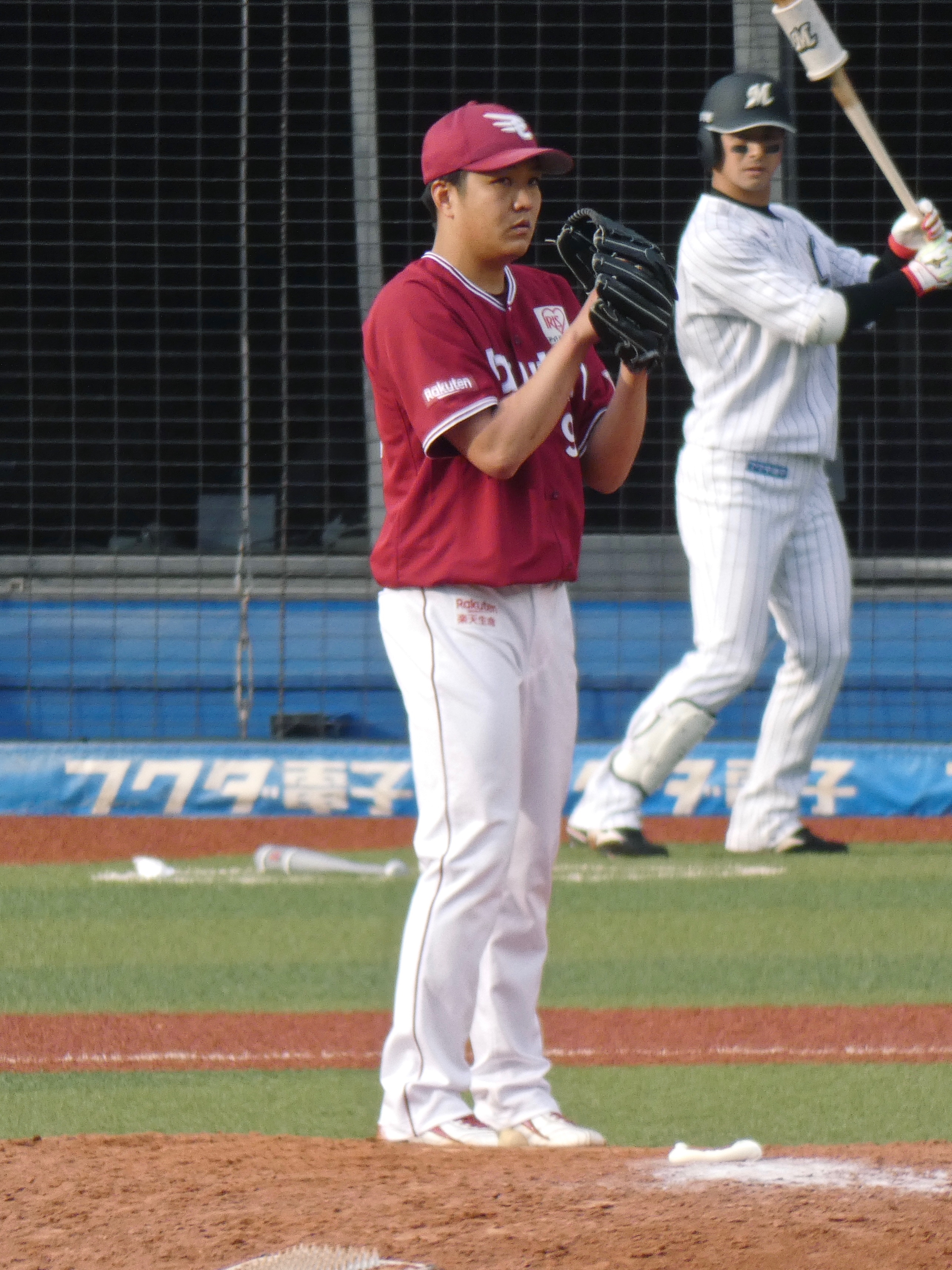 東北楽天ゴールデンイーグルスの選手「石橋良太」。ZOZOマリンスタジアムにて。